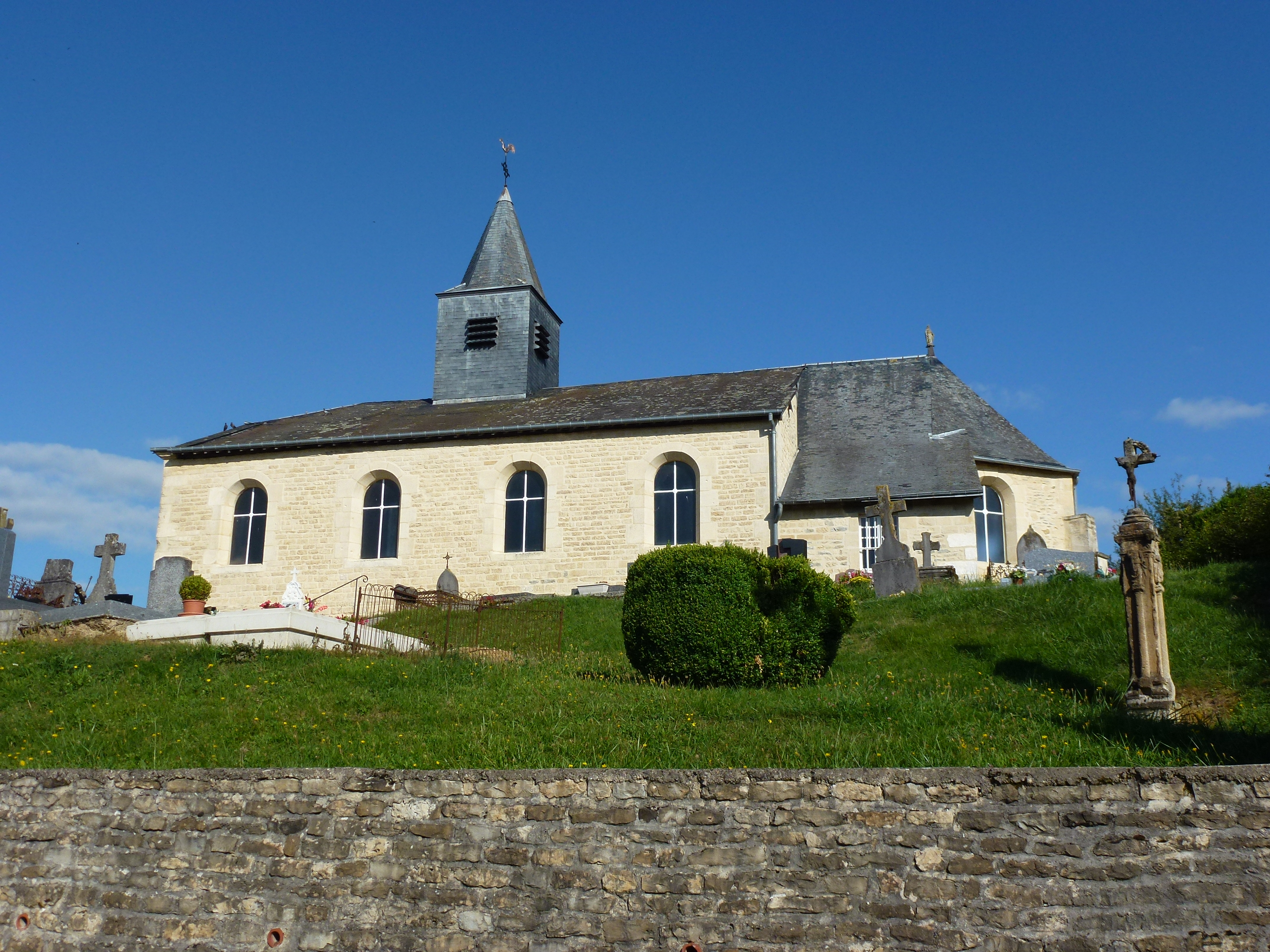 Lametz (Ardennes) église